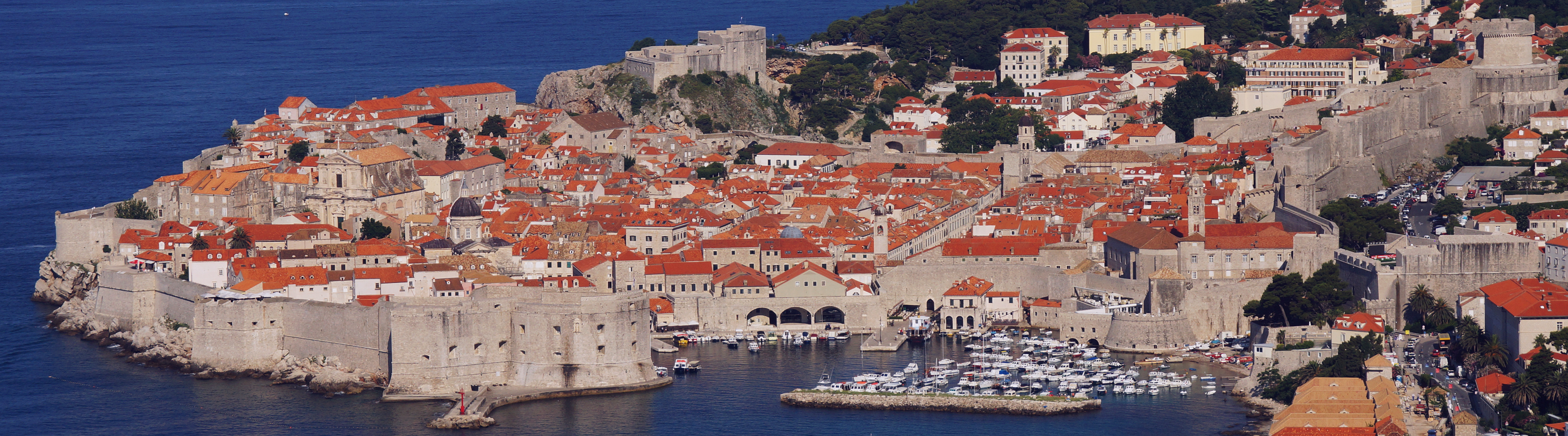 Mediterranes Panorama der Altstadt von Dubrovnik, Ansicht von Osten. Hrvatska Kroatien - Foto Wolfgang Pehlemann DSC05194